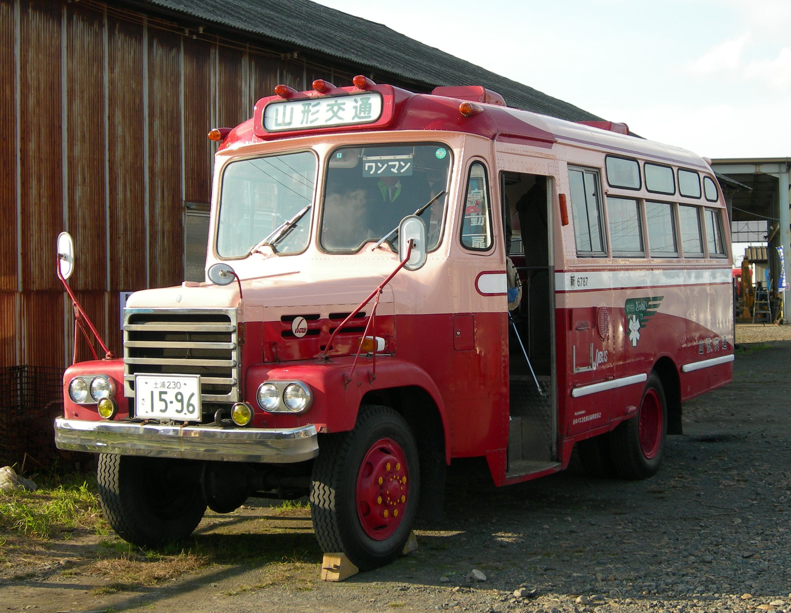 いすゞＴＳＤ４０ 日本バス友の会の保存車両